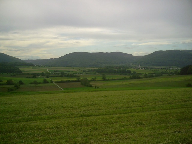 KlettgauUnknown klettgau germany